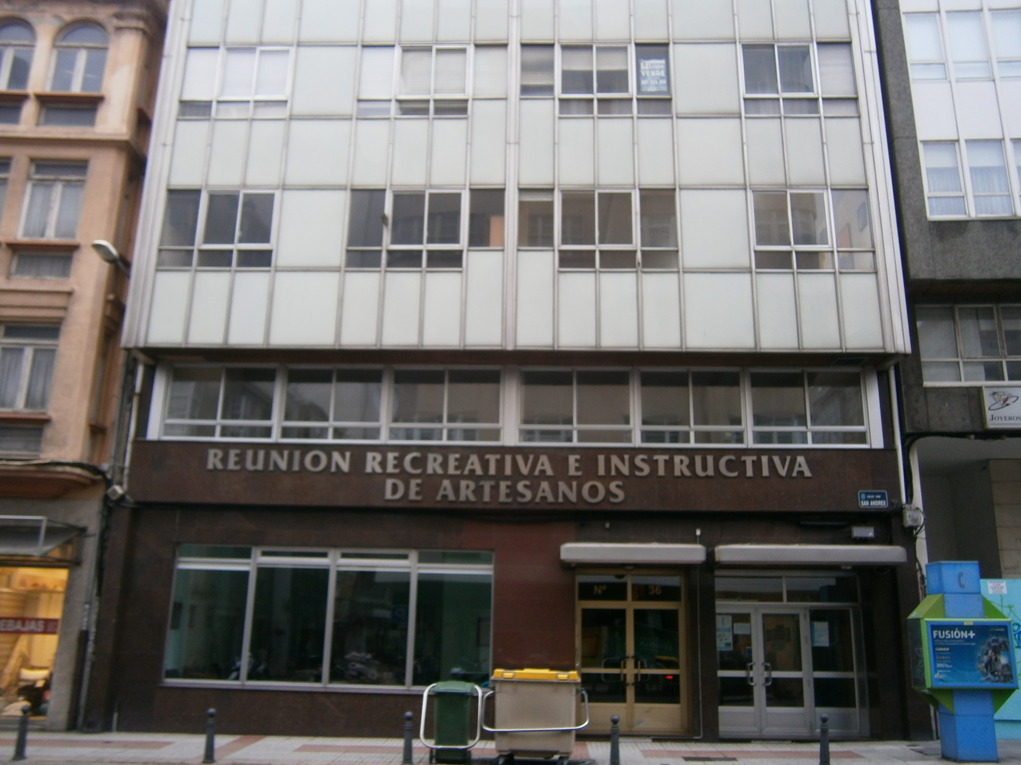 Sede do Circo de Artesáns da Coruña